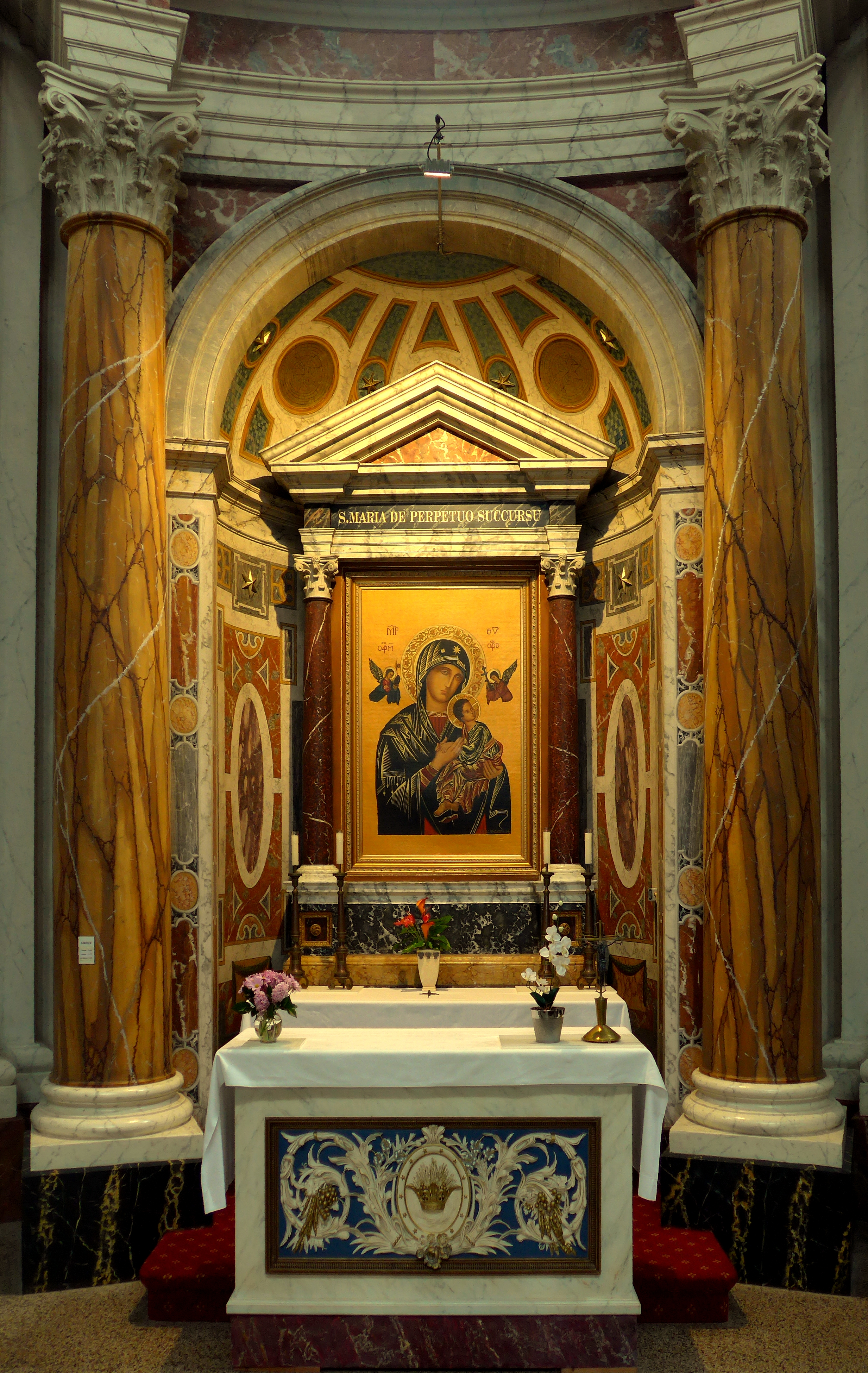 Oudenbosch Basilica S. Maria perpetuo succursu